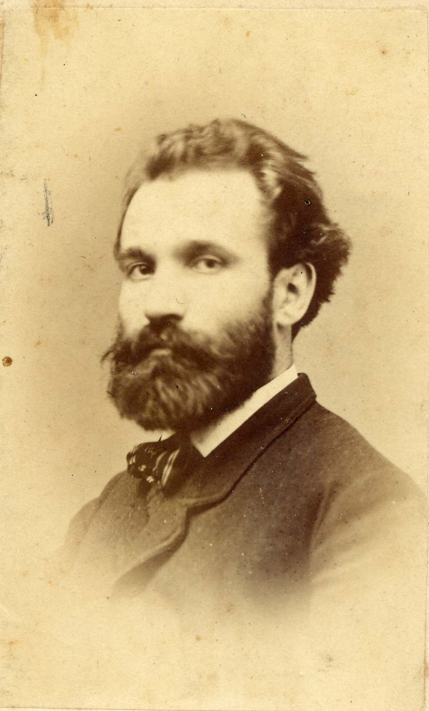 Achille Sacchi